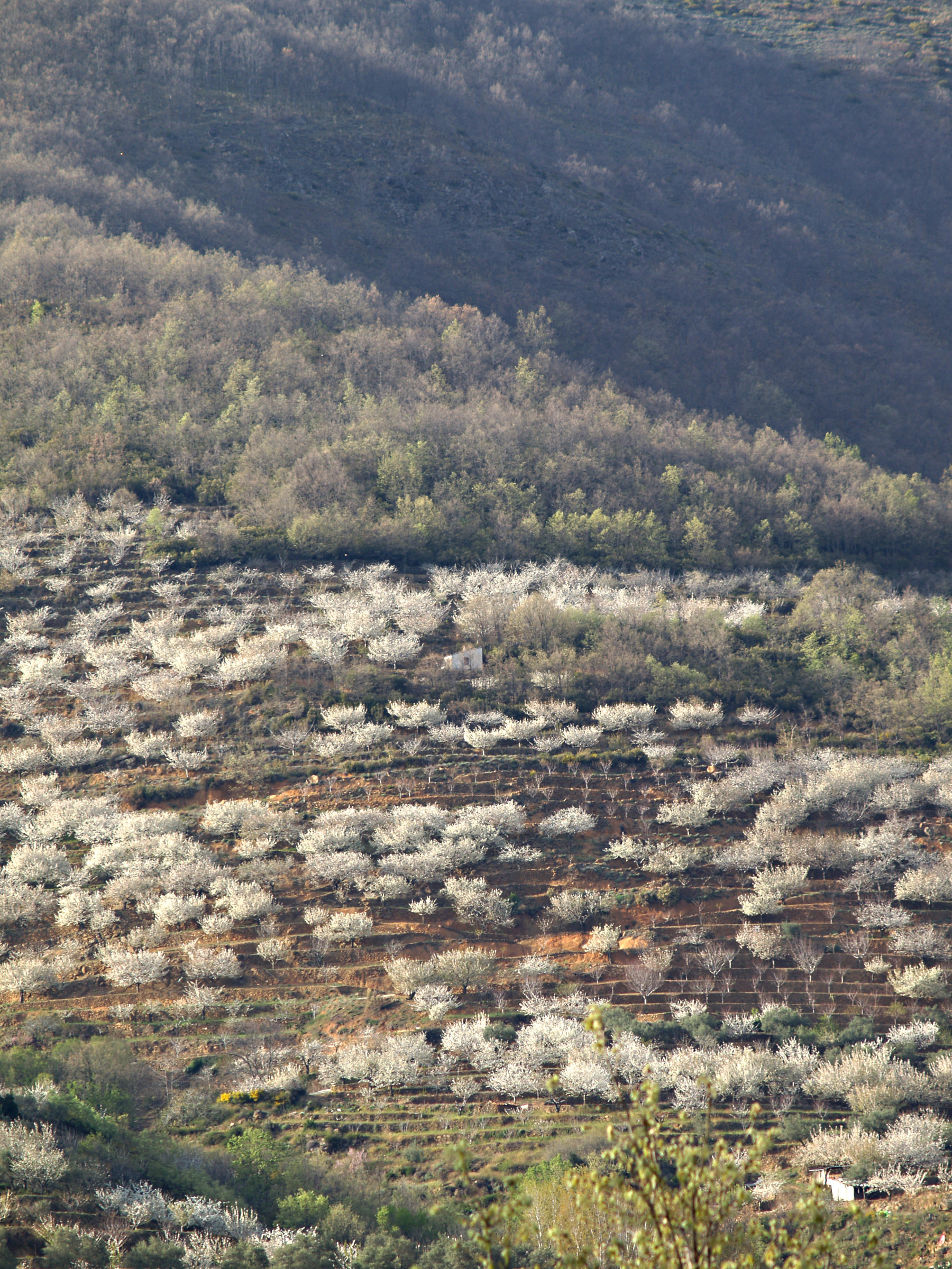 Prunus avium. Cerezos en el valle del Jerte. Jerte, Cáceres.